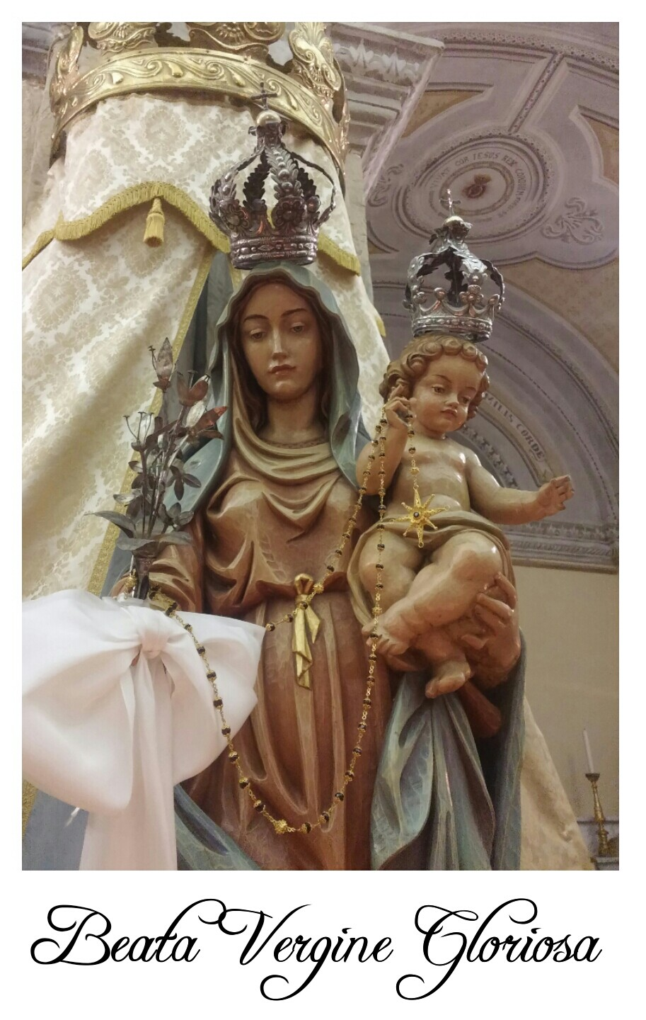 Beata Vergine Gloriosa